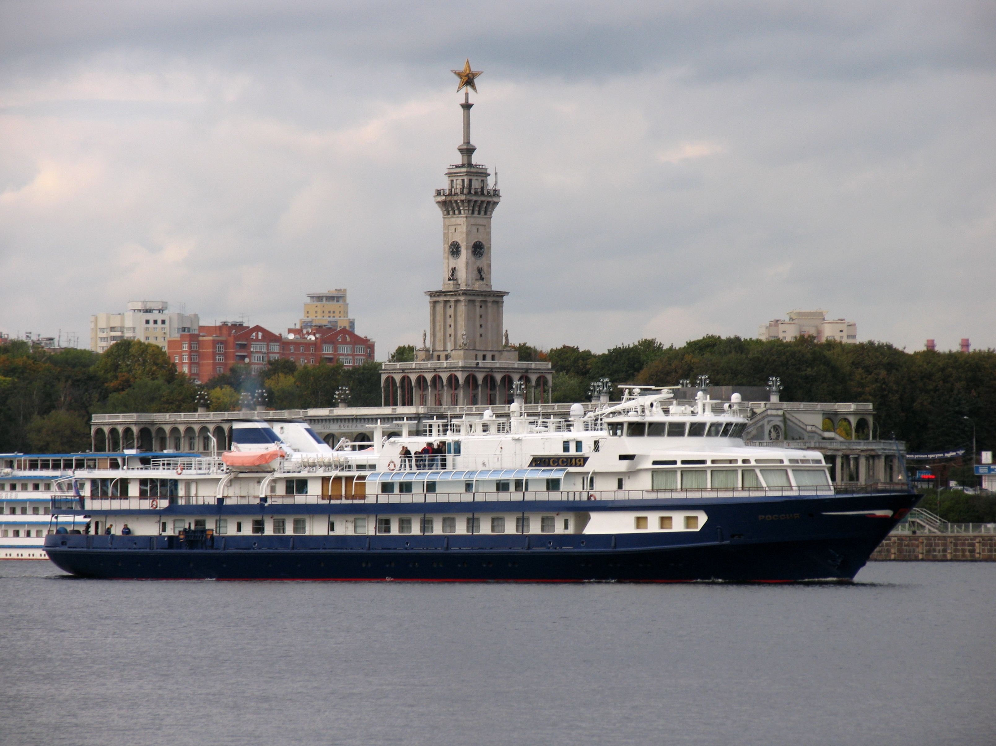 Президентское судно "Россия" на фоне вокзала Северного речного порта.